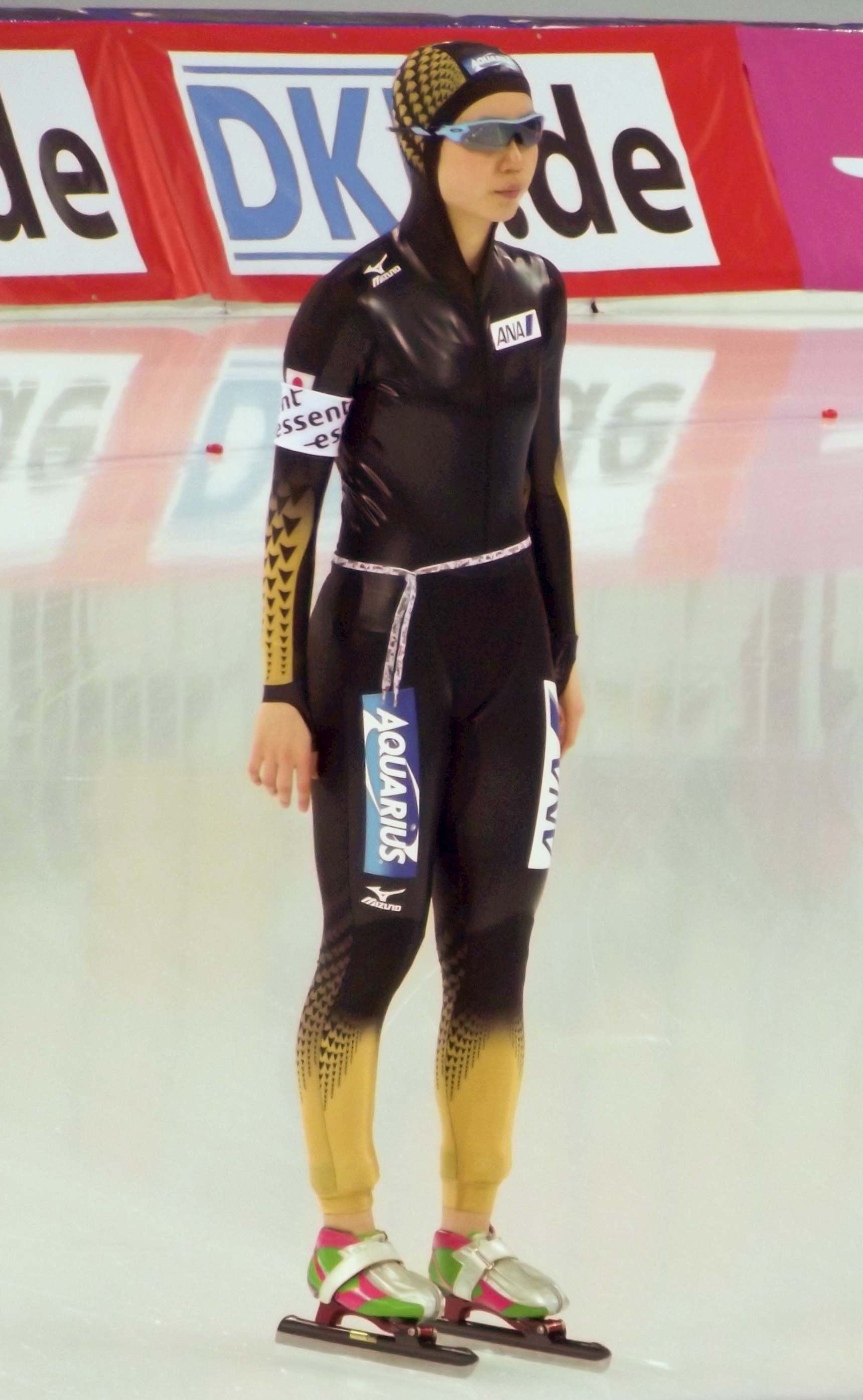 Miho Takagi